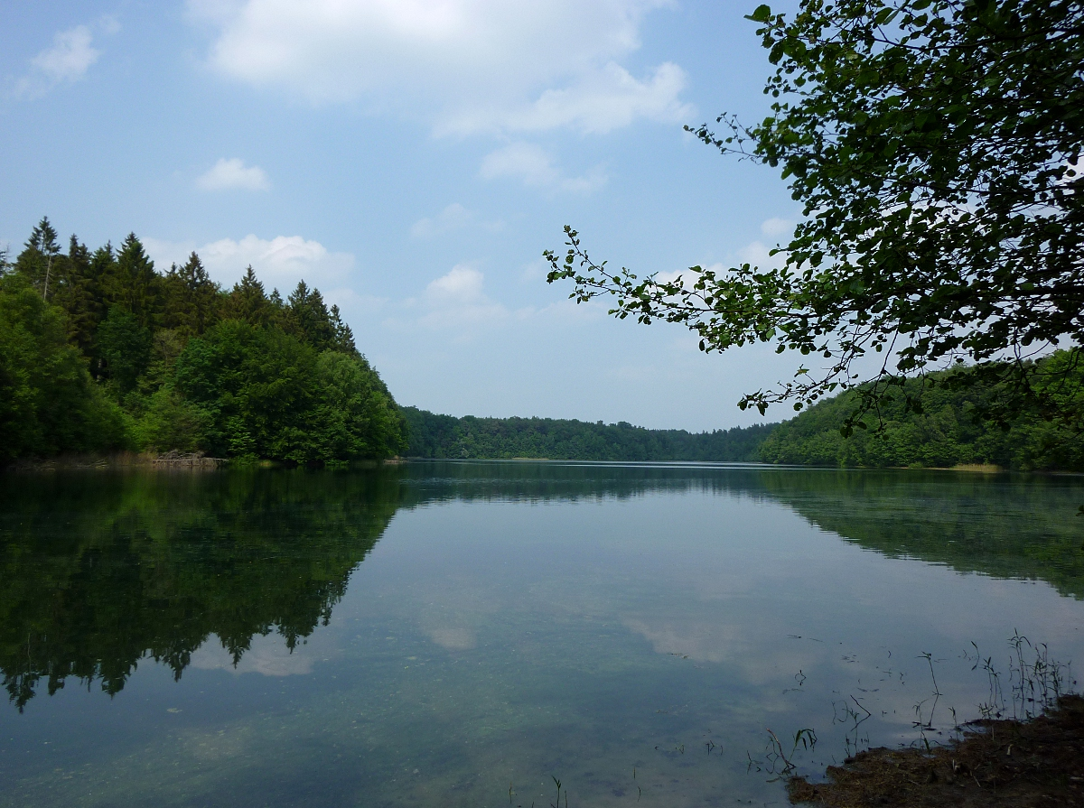 Der Garrensee im NSG Salemer Moor mit angrenzenden Wäldern und Seen und im Naturpark Lauenburgische Seen